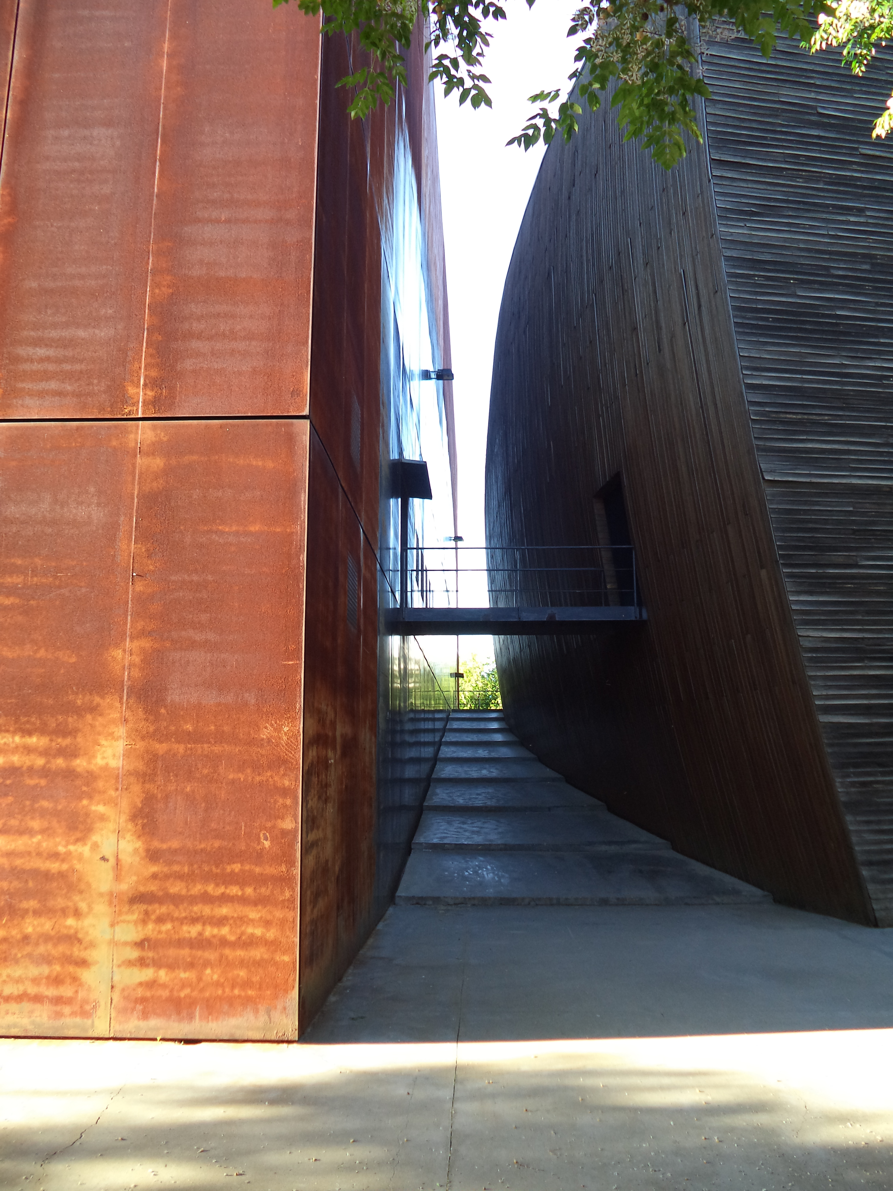 Pabellón de Finlandia de la Expo 92